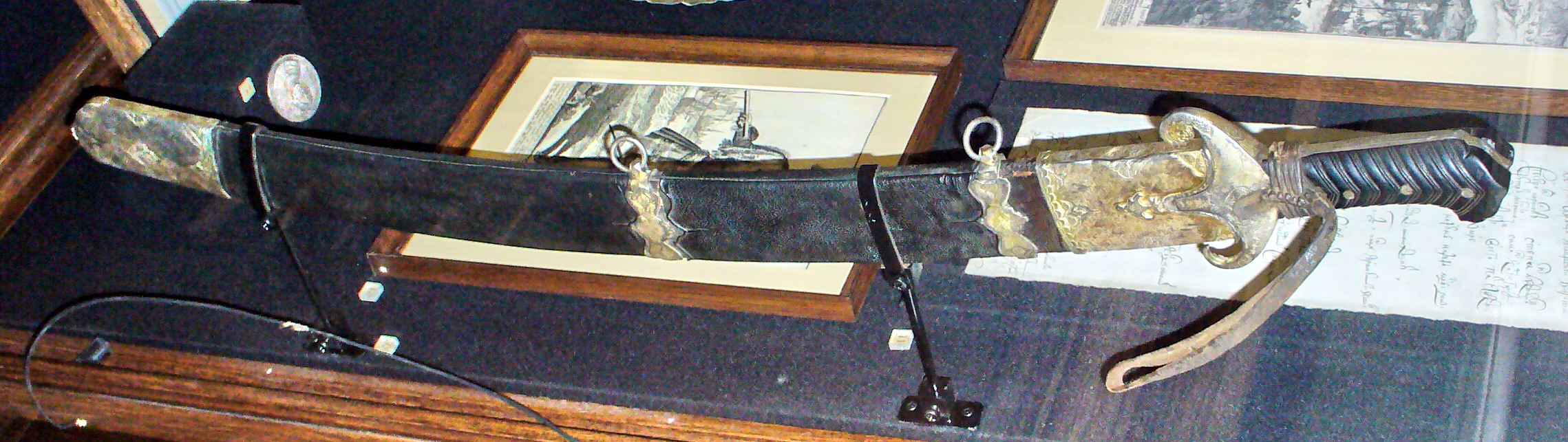 Турецкая сабля (гаддарэ), XVII век. Сталь, серебро, рог, дерево, кожа.